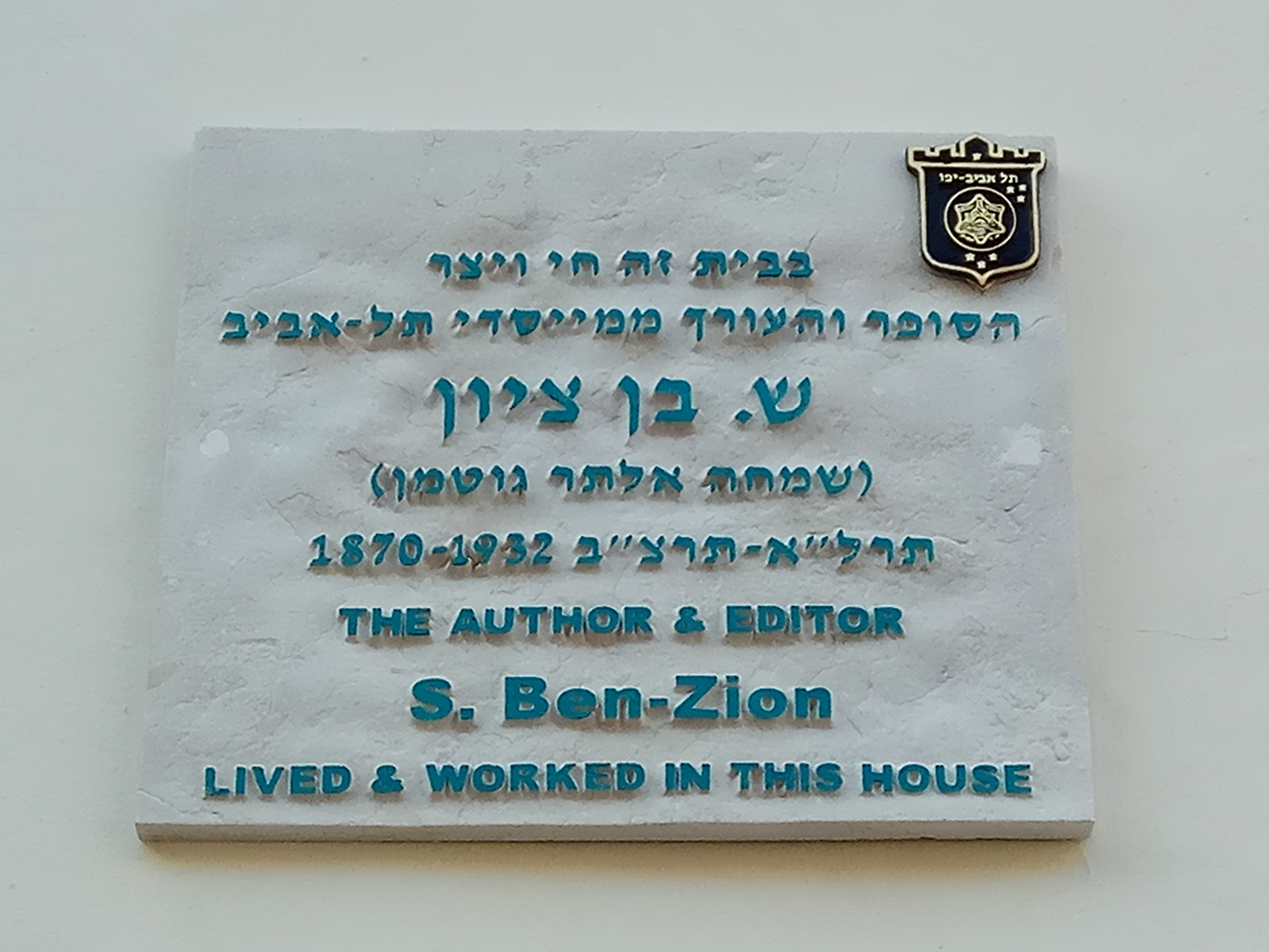 לוחית זיכרון על ביתו של שמחה בן ציון ברחוב בוסתנאי 10 בנווה צדק בתל אביב